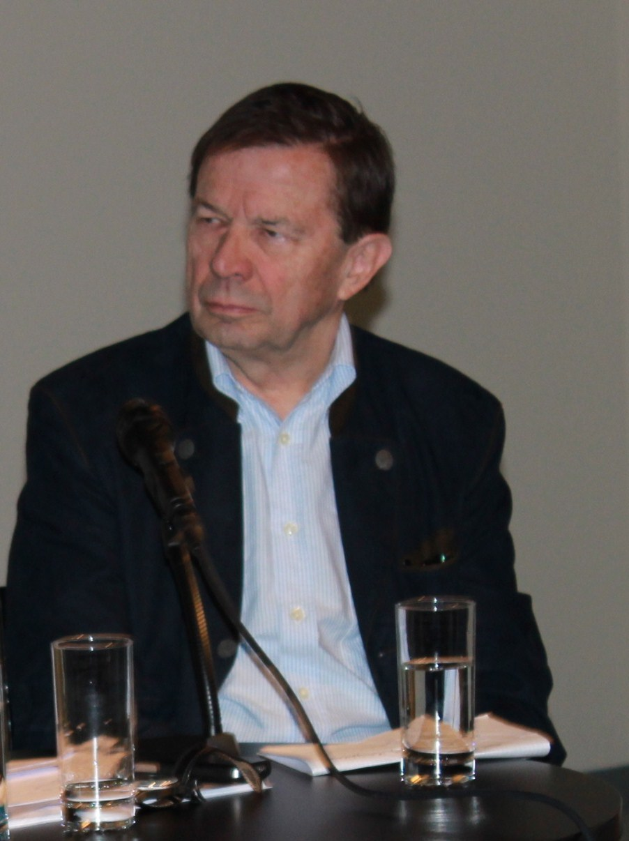 Der frühere FDP-Politiker Franz Steinegger an einer Podiumsdiskussion.